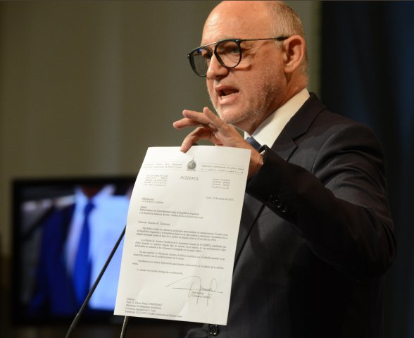 Nisman muestra las “alertas rojas” contra los ciudadanos iraníes imputados, para "desenmascarar las mentiras de Nisman", como dijo.